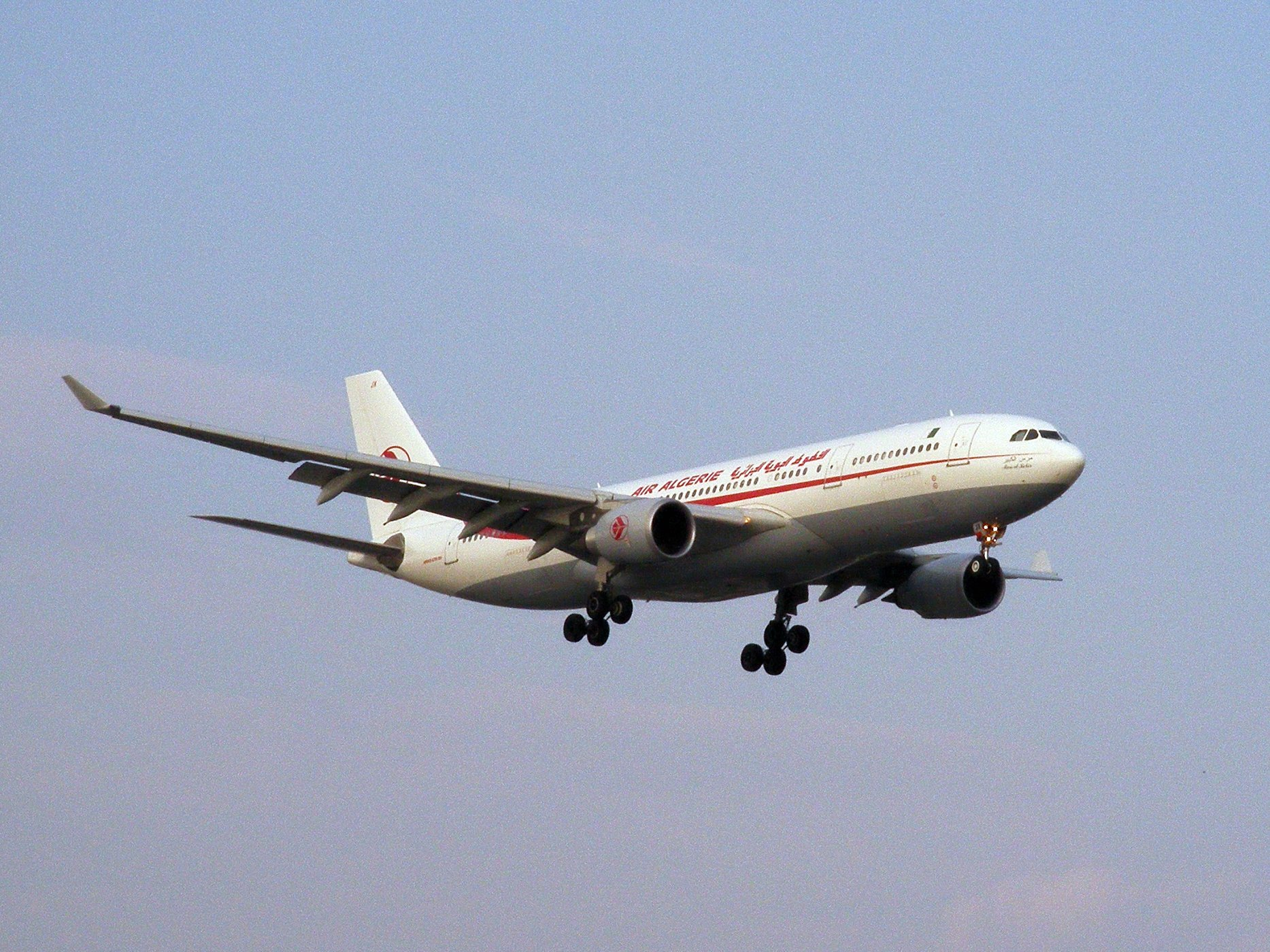 Airbus A330-200 d'Air Algérie. Atterrissage à l'aéroport Montréal-Trudeau (YUL) (Québec, Canada).